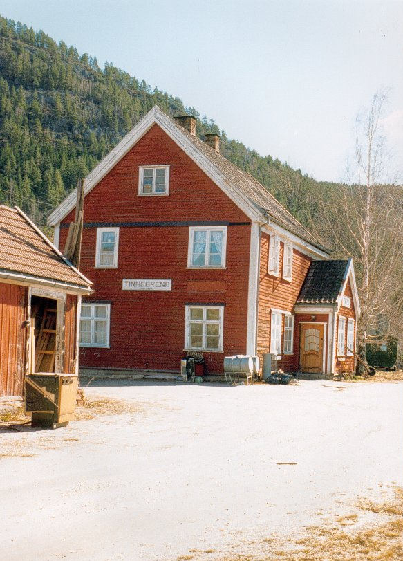 Tinnegrend på Tinnosbanen (Bratsbergbanen), Telemark